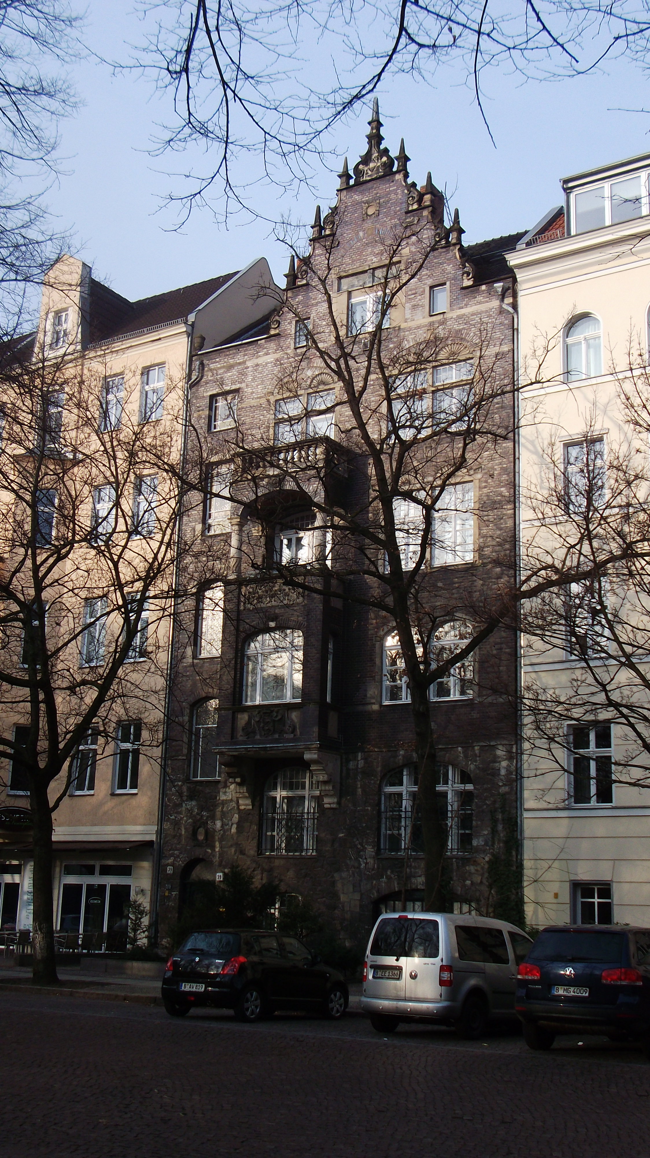 Wohnhaus